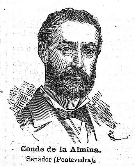 Melchor Sangro Rueda